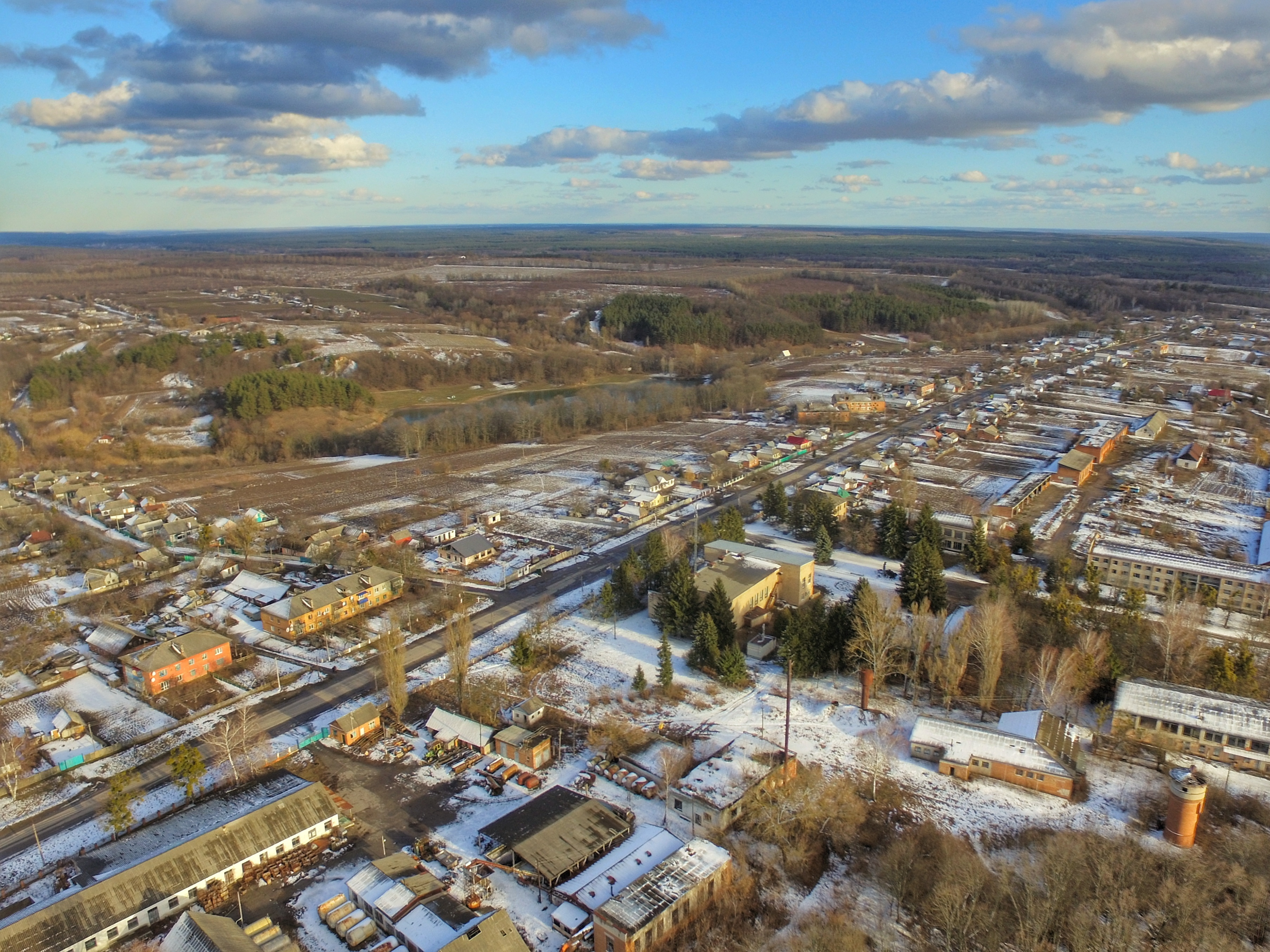 с. Городнє, Краснокутський район, Харківська область